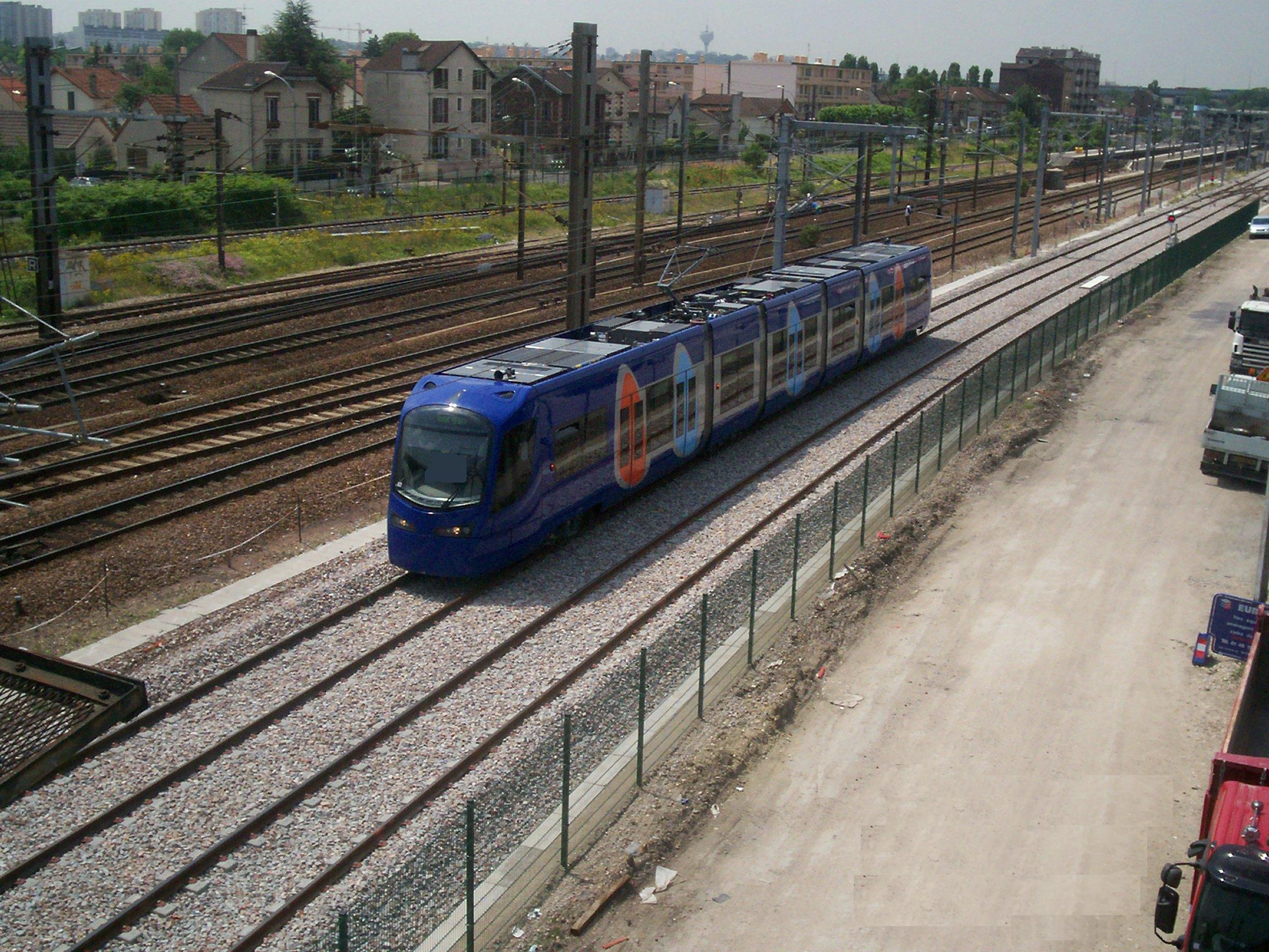 Rame Tram-Train U 25500 entre Bondy et la Remise à Jorelle lors des essais